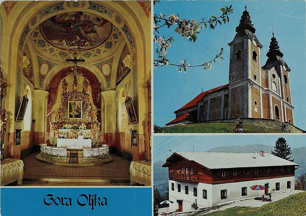 Razglednica Polzele.